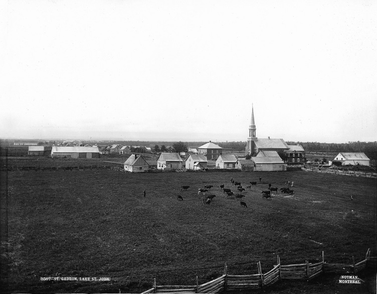 Saint-Gédéon-de-Grandmont vers 1903 Photographie, Saint-Gédéon, Lac-Saint-Jean, QC, vers 1903, Plaque sèche à la gélatine, 20 x 25 cm